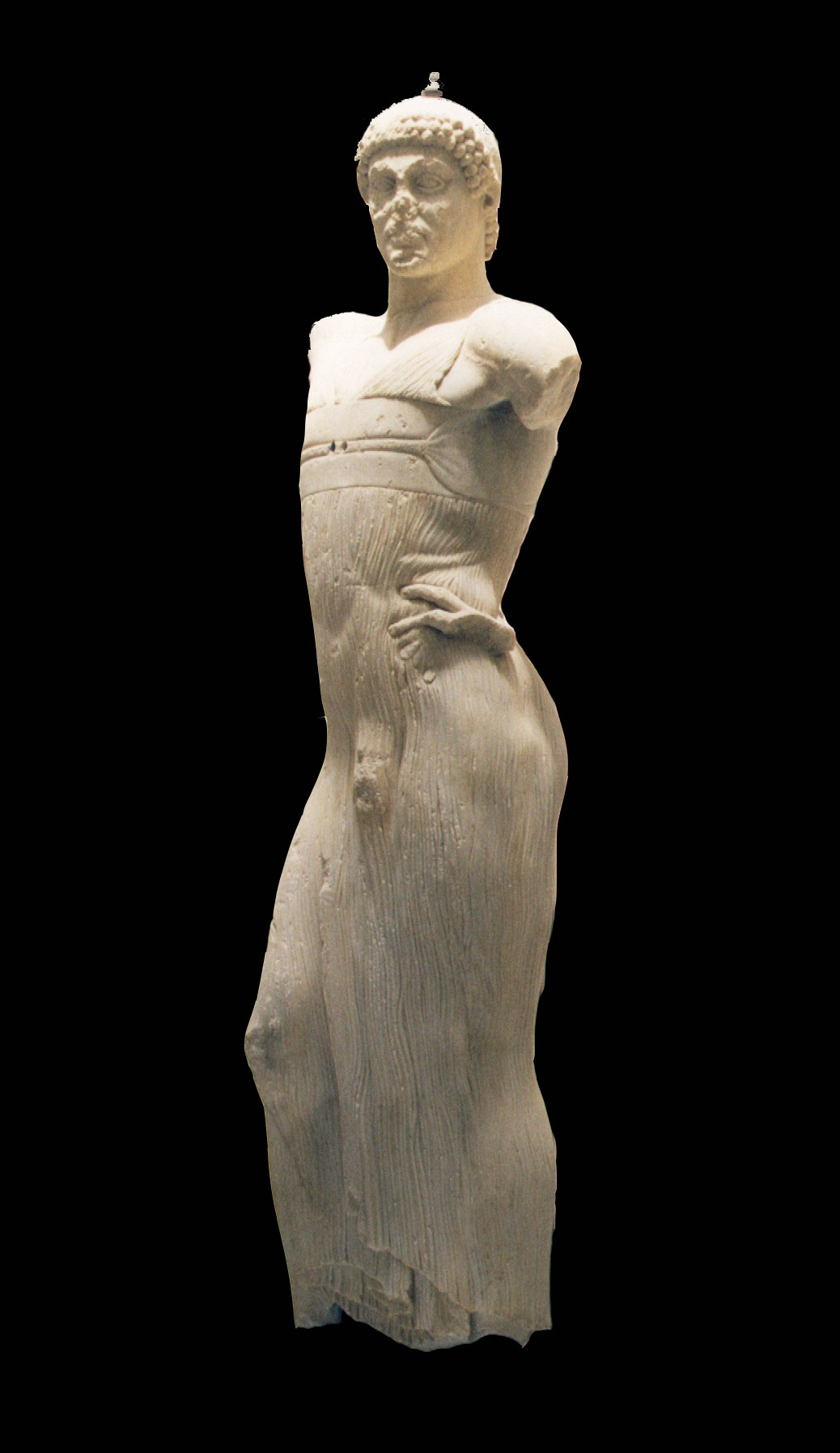 Gresk marmorstatue på øya Mozia.